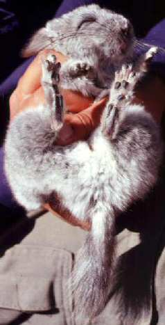 Chinchilla brevicaudata , Verso. Chile.